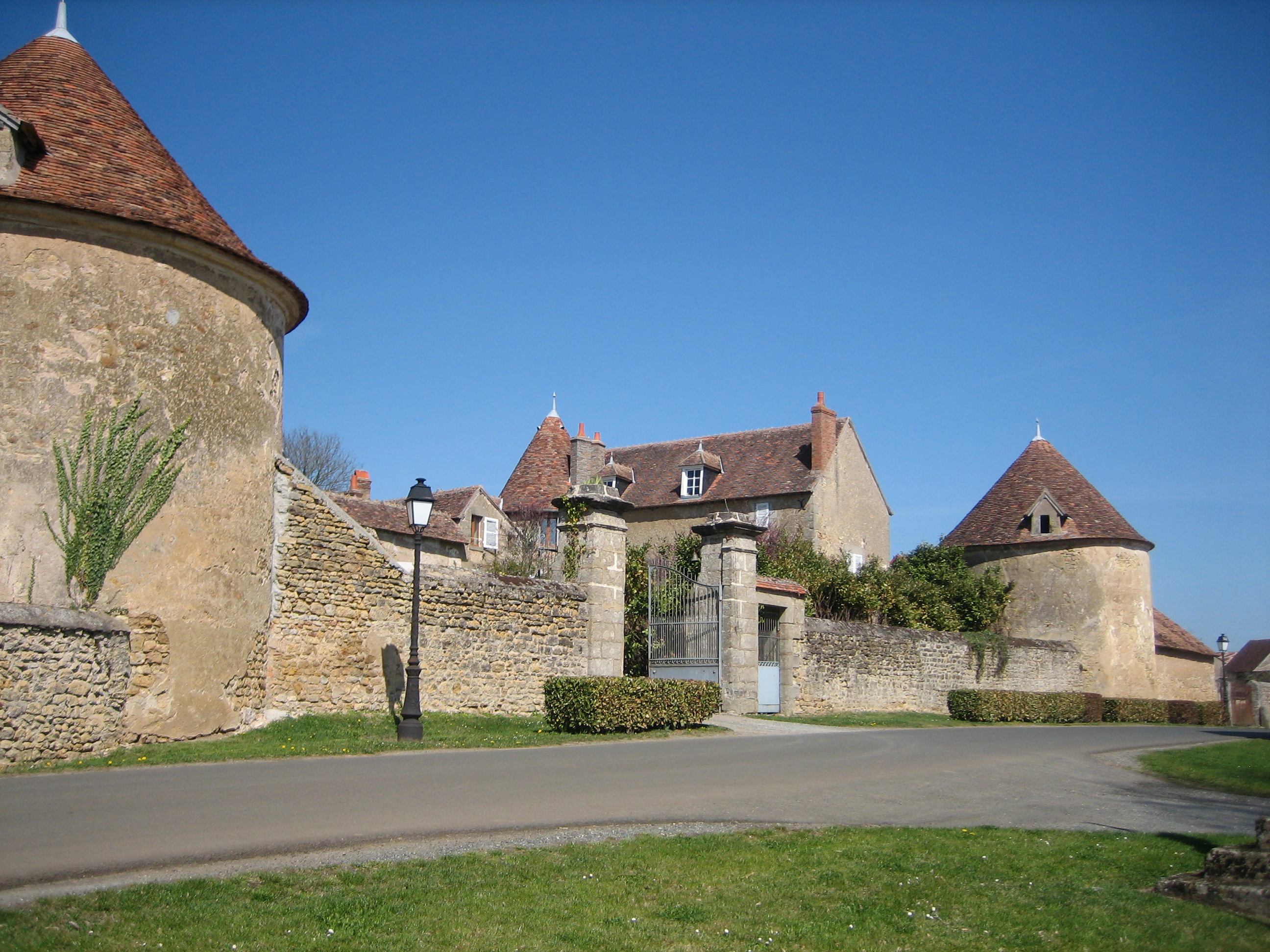 Le Château de Montlevicq - vue latérale